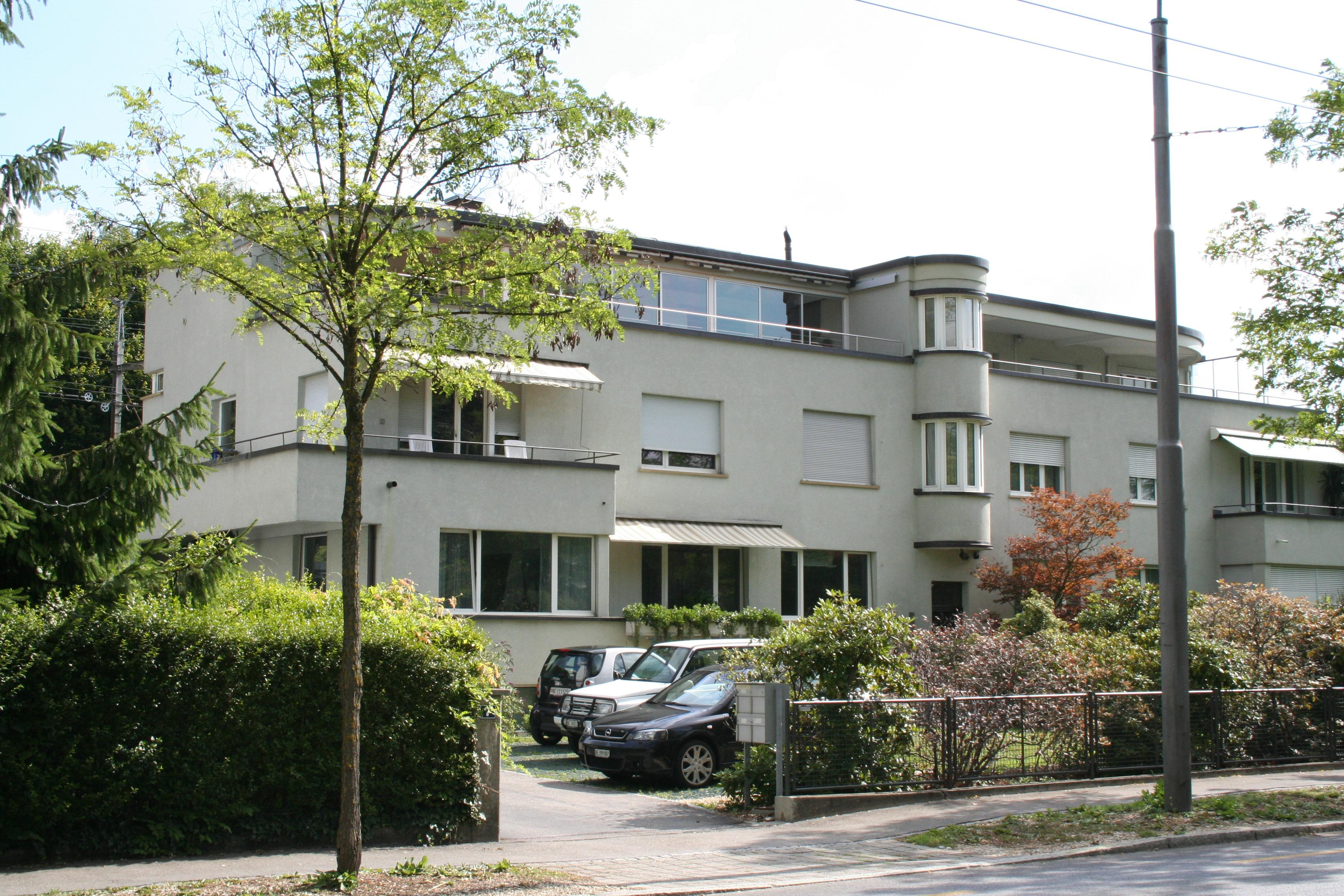 Reihenhäuser Ländtestrasse Biel Arch. (1930)